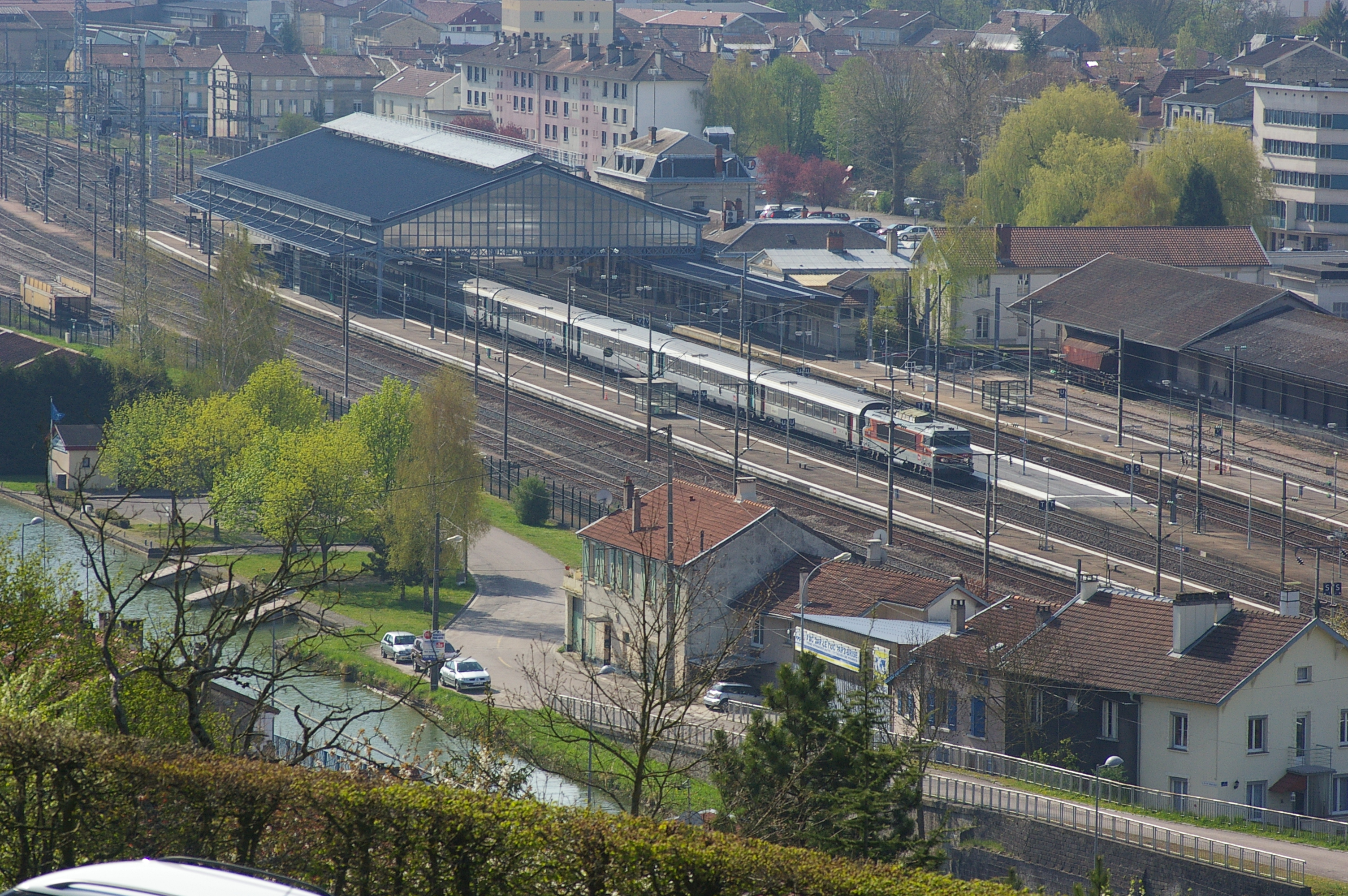 vue depuis la Côte Sainte Catherine